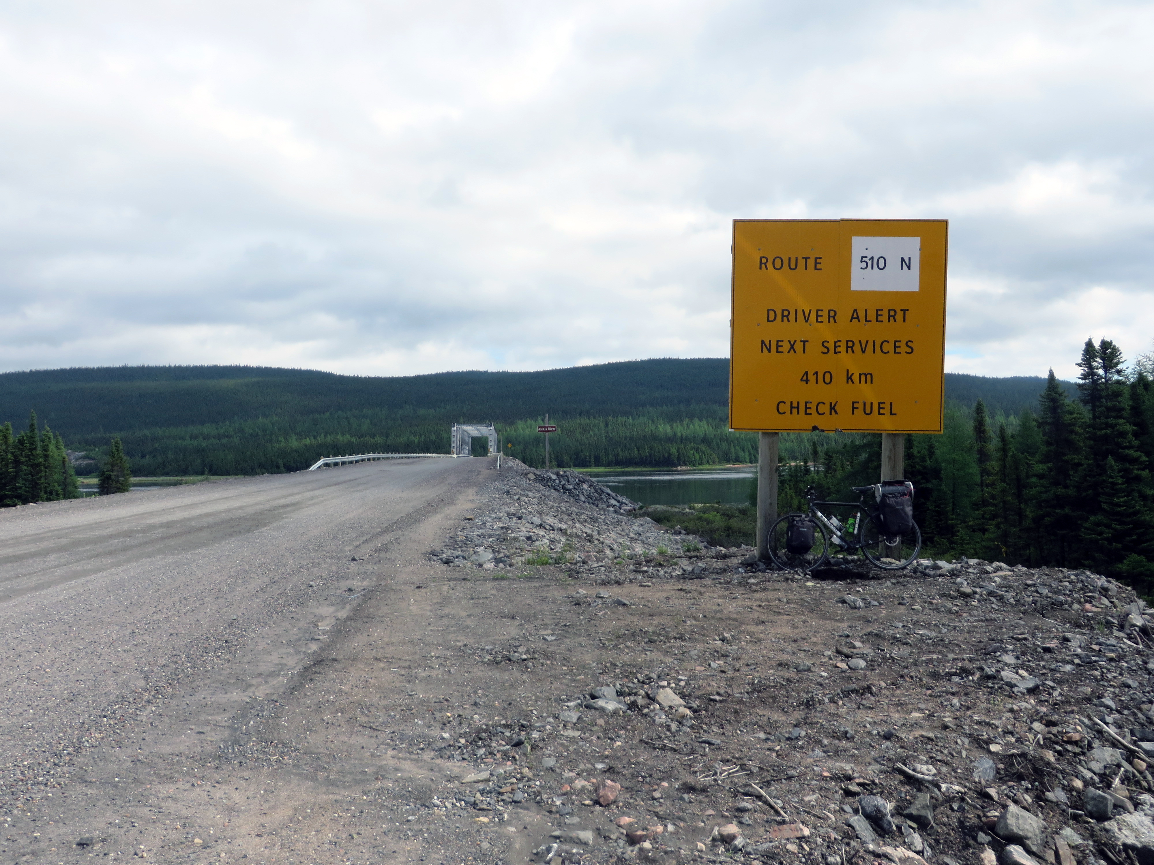 Route 510 à la sortie nord de Port Hope Simpson